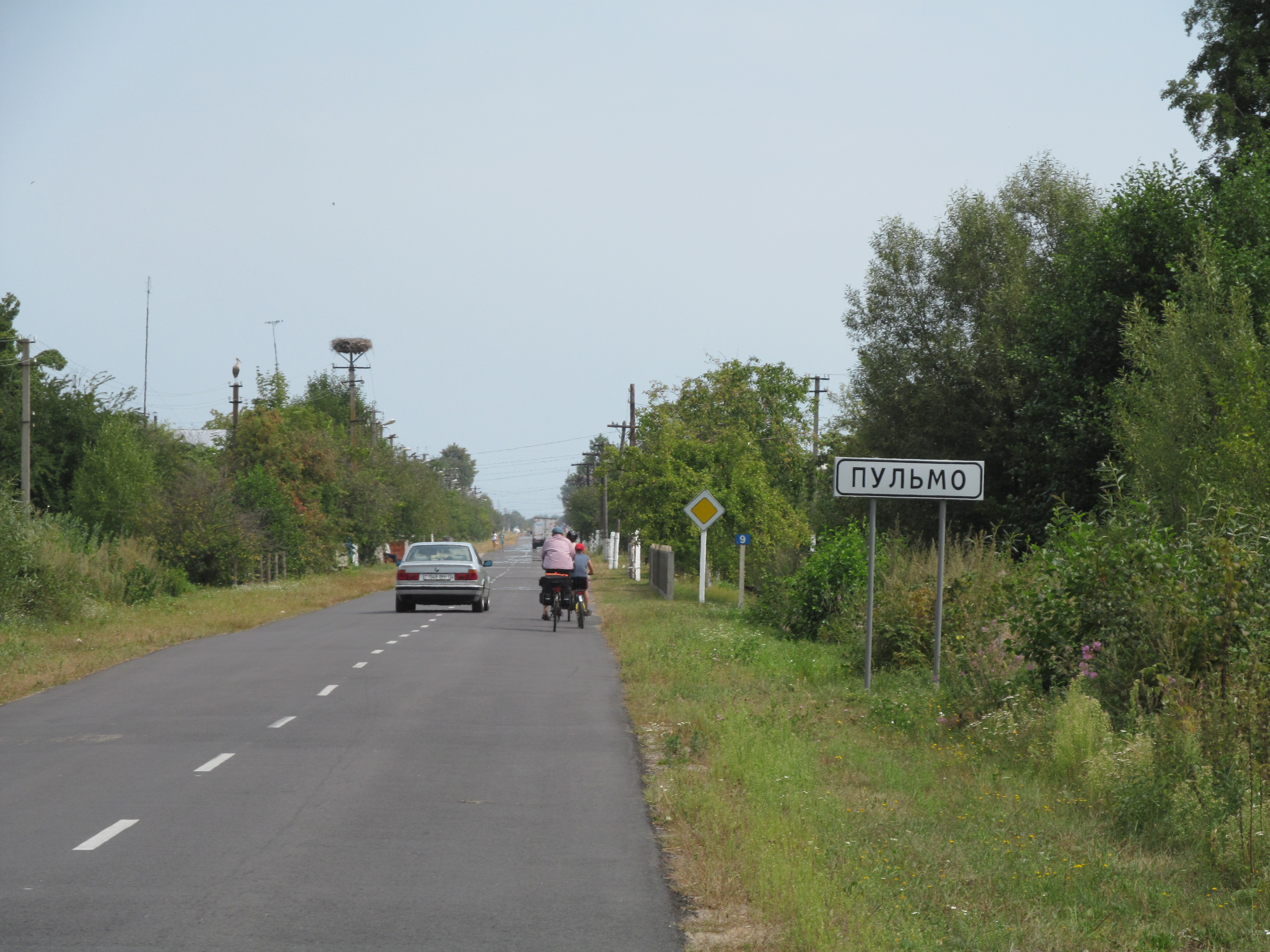 Widok drogi wjazdowej do Пульмо od strony miejscowości Залісся. Sierpień 2013.